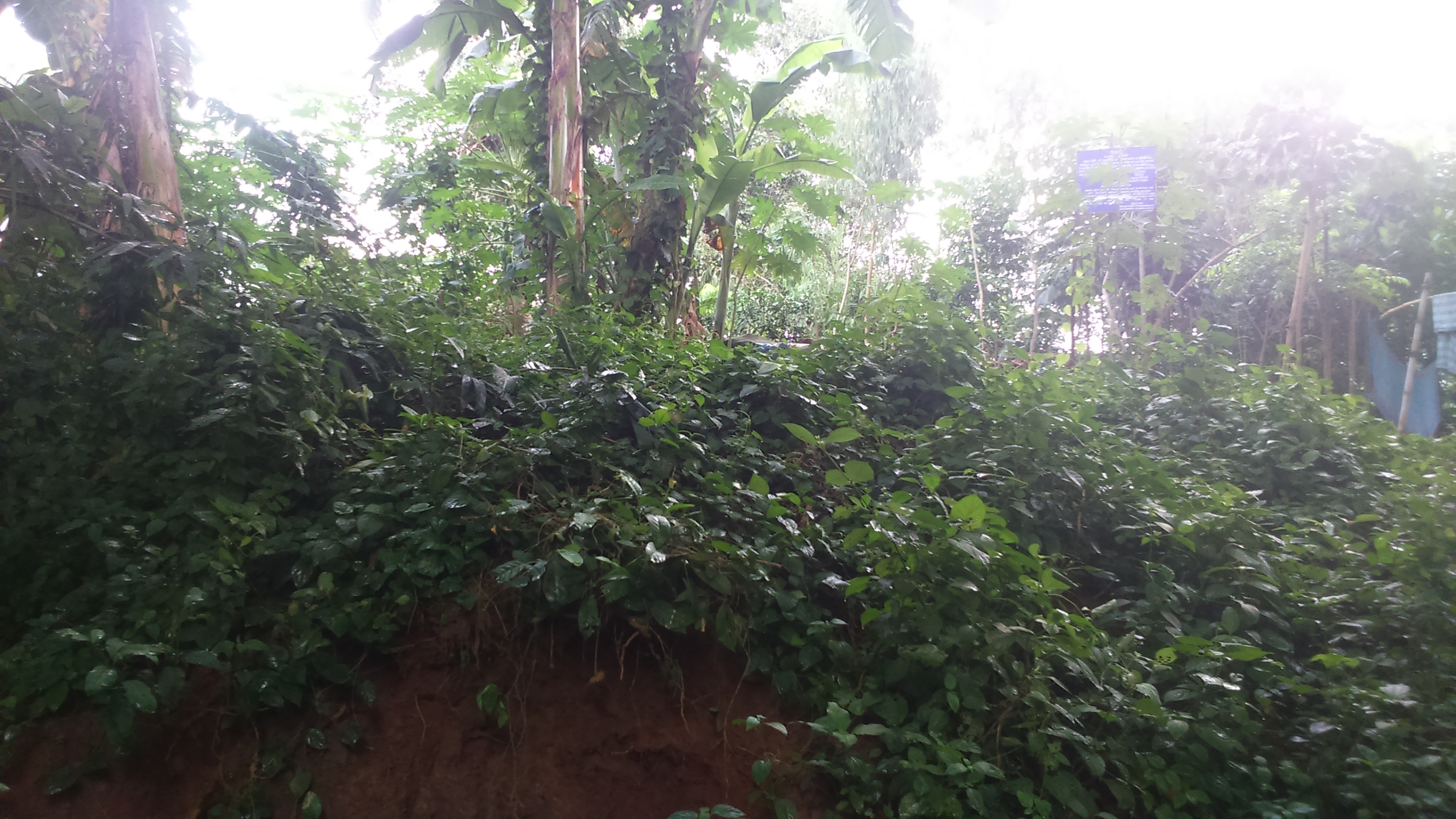 সন্ন্যাসীর ধাপ- ১নং (ছোট টেংরার ধাপ)